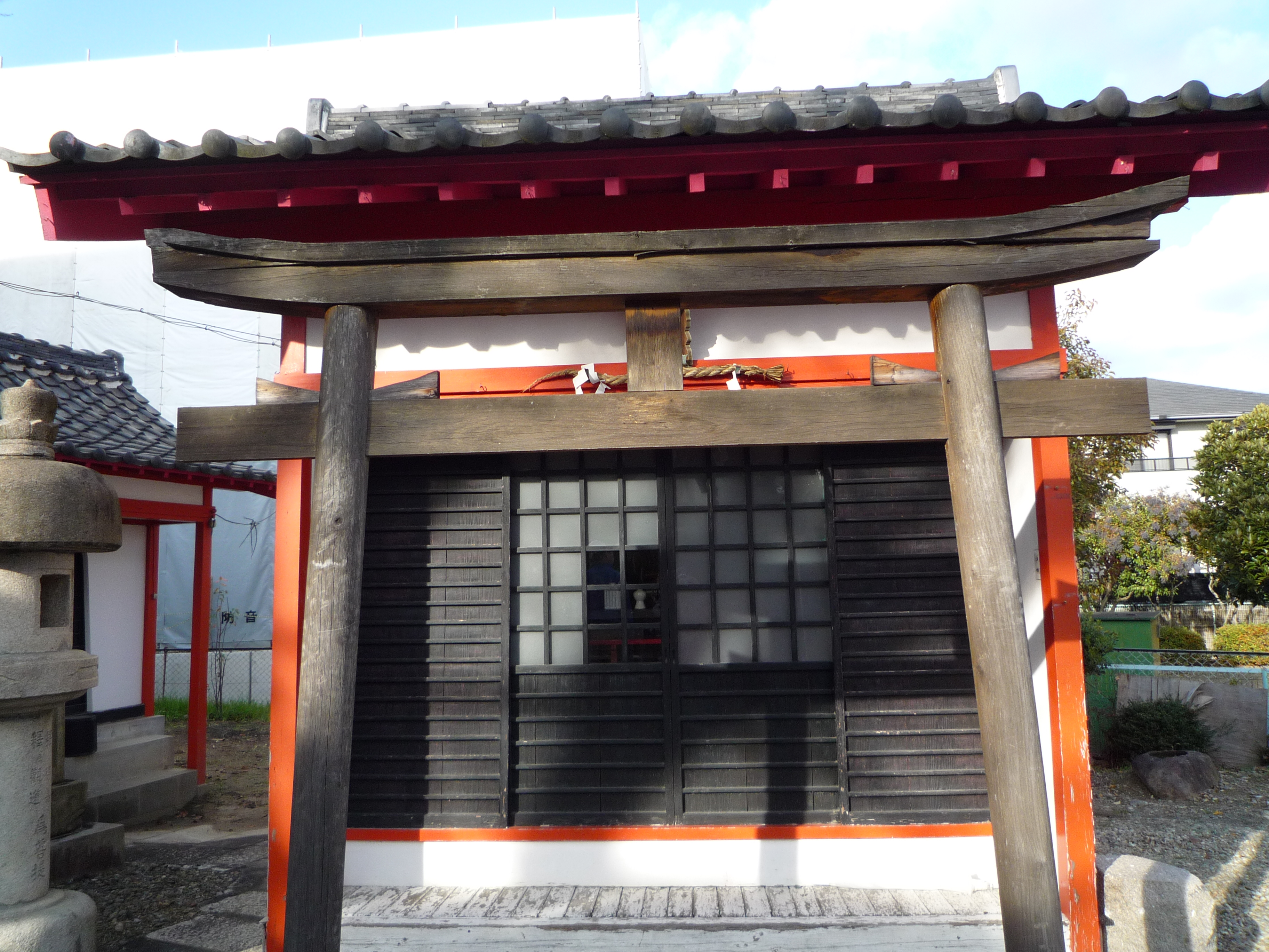 不動寺（大阪府豊中市）白鹿堂